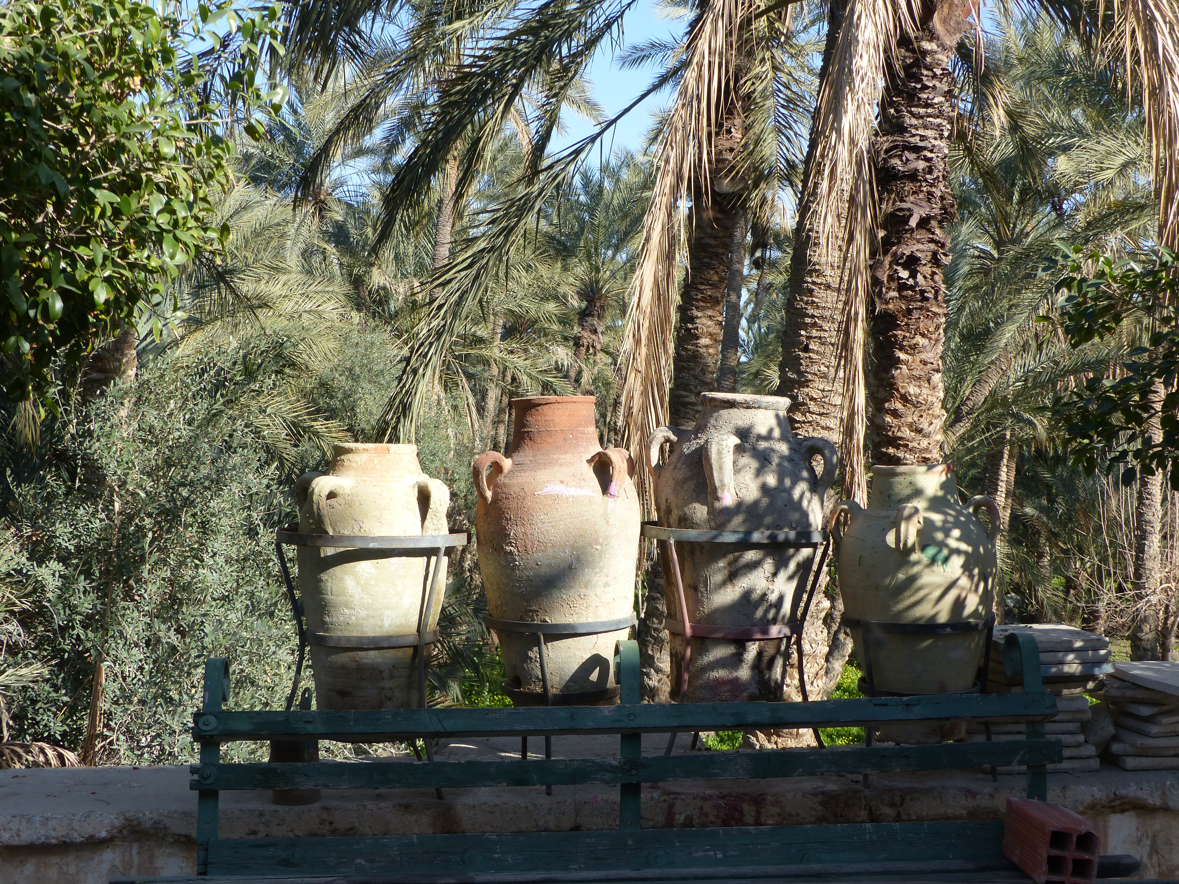 Des jarres au bord de la route du hameau de Bled el-Hadhar, près de Tozeur, Tunisie